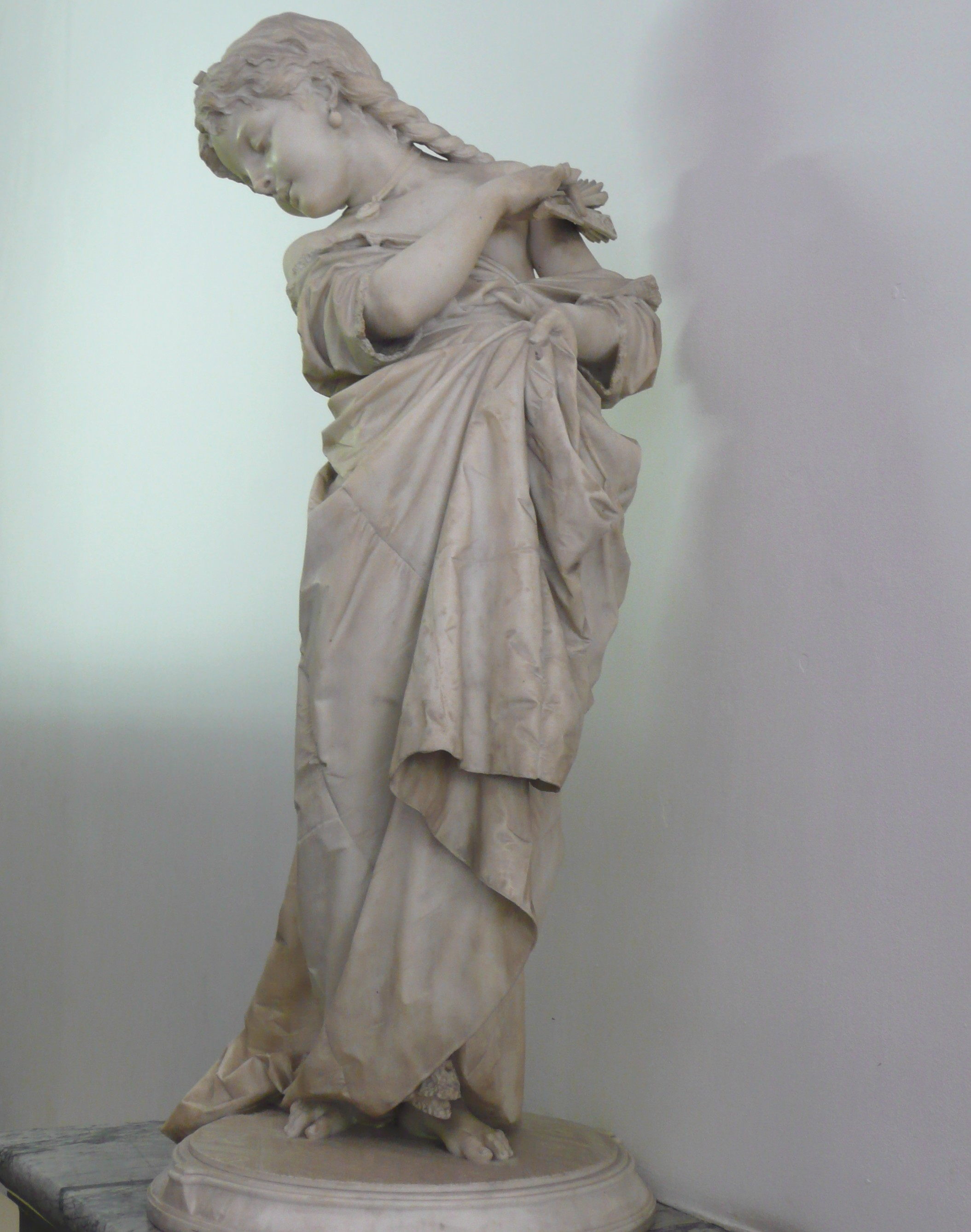 Au musée des Beaux-Arts Jules Chéret de Nice (Alpes-Maritimes,France), Vanarella, marbre de Francesco Barzaghi réalisé en 1877 à Milan où il a vécu toute sa vie.